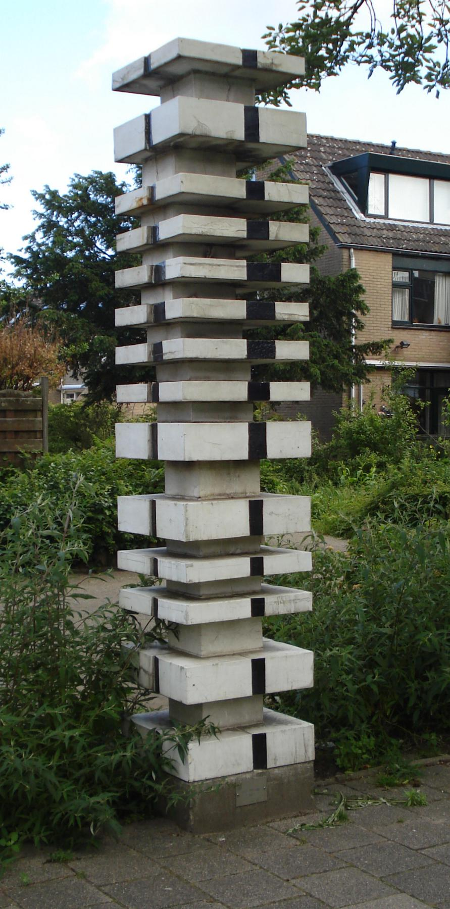 Voorburg-Leidschendam, Valkhof 67, plantsoen. Kunstwerk "Zuil" van Henk Trumpie, 1971.